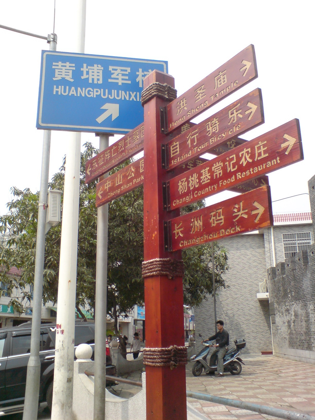 中文（中国大陆）: 广州长洲岛上的旅游指示路牌